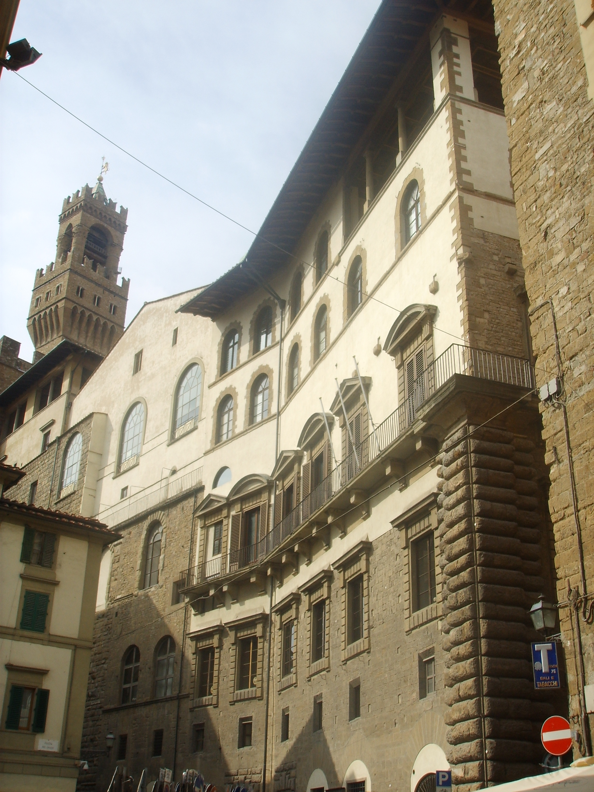 Palazzo Vecchio (back side) in Florence, Italy